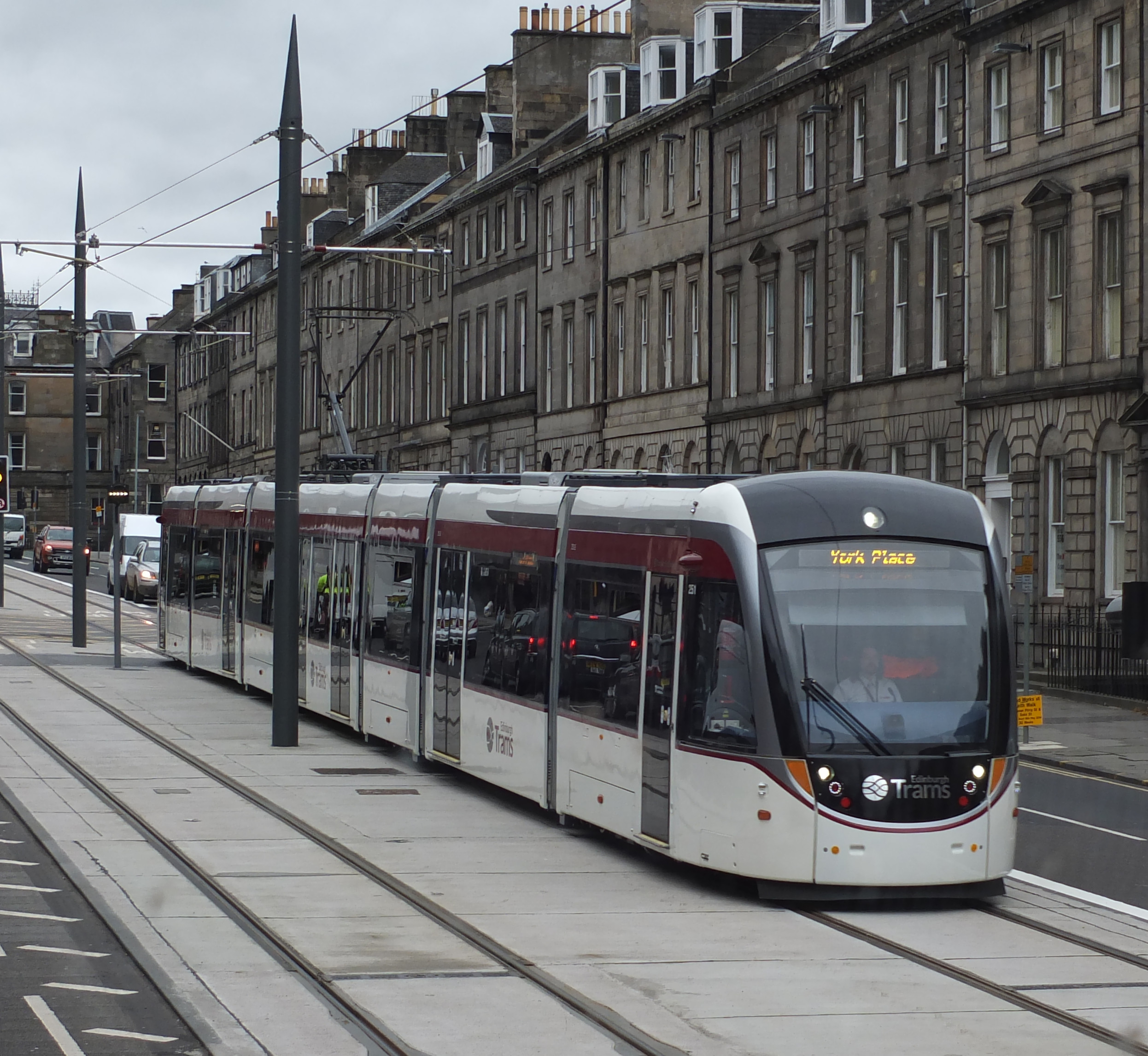 Edinburgh tram in York Place.